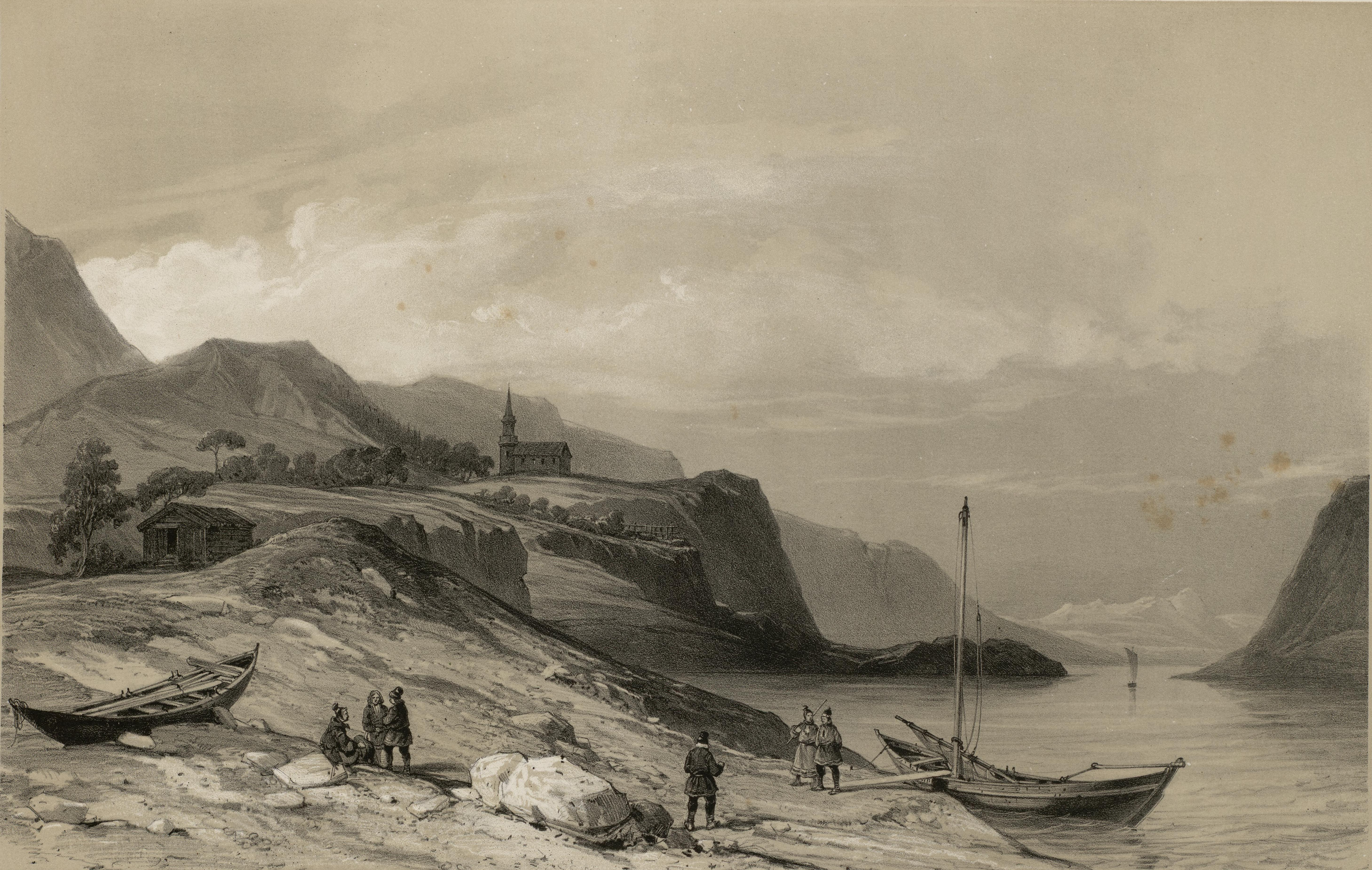 Illustrasjon hentet fra boken "Voyages de la Commission scientifique du Nord, en Scandinavie, en Laponie, au Spitzberg et aux Feröe" av ukjent forfatter og utgitt av Arthus BertrandParis : Arthus Bertrand, [1852] (Paris, [1852])